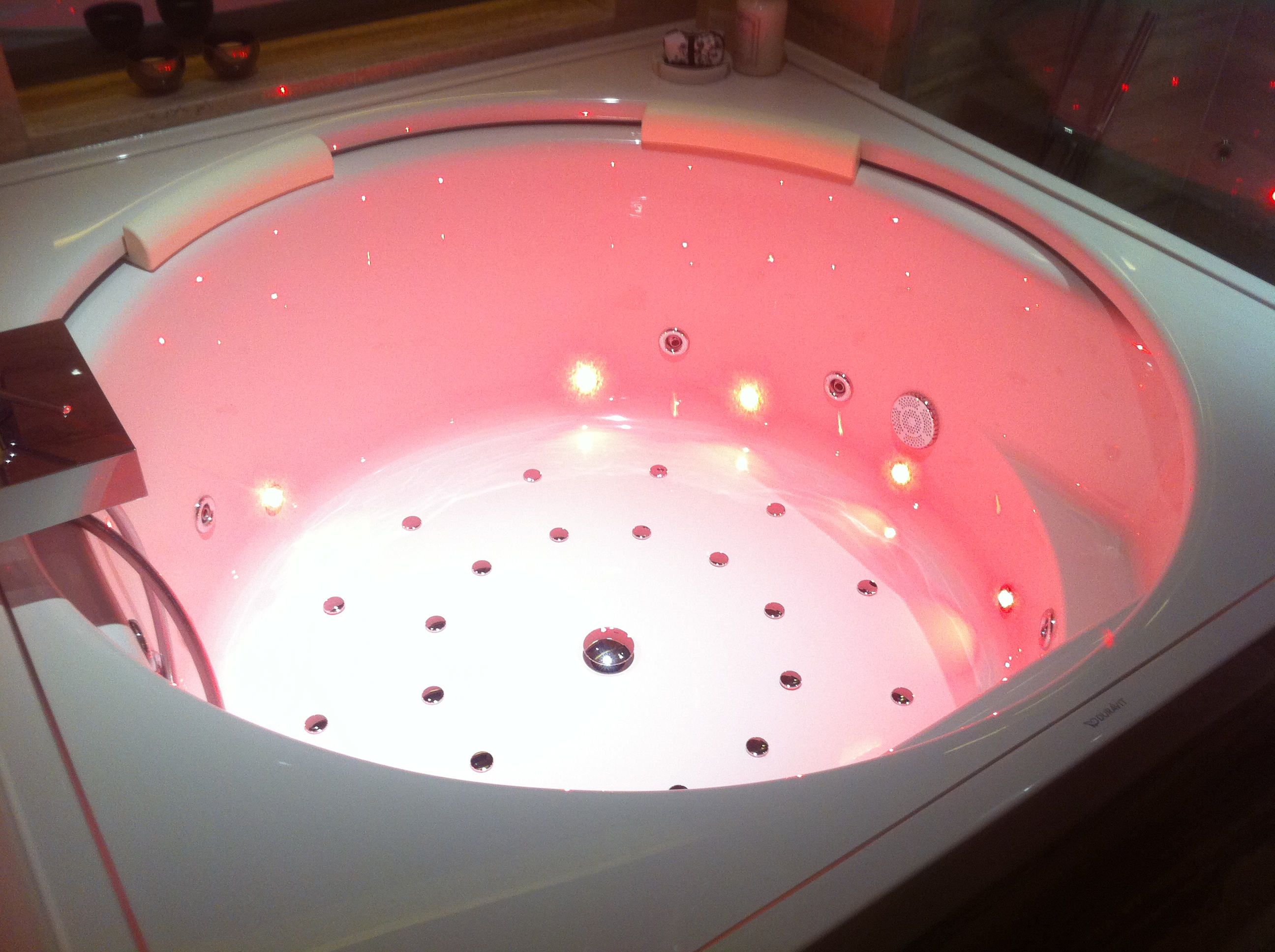 中文（香港）: 深灣9號 Marinella T6-A 名牌zh:浴缸